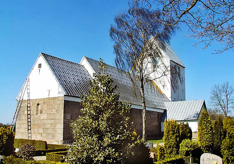 fra nordøst